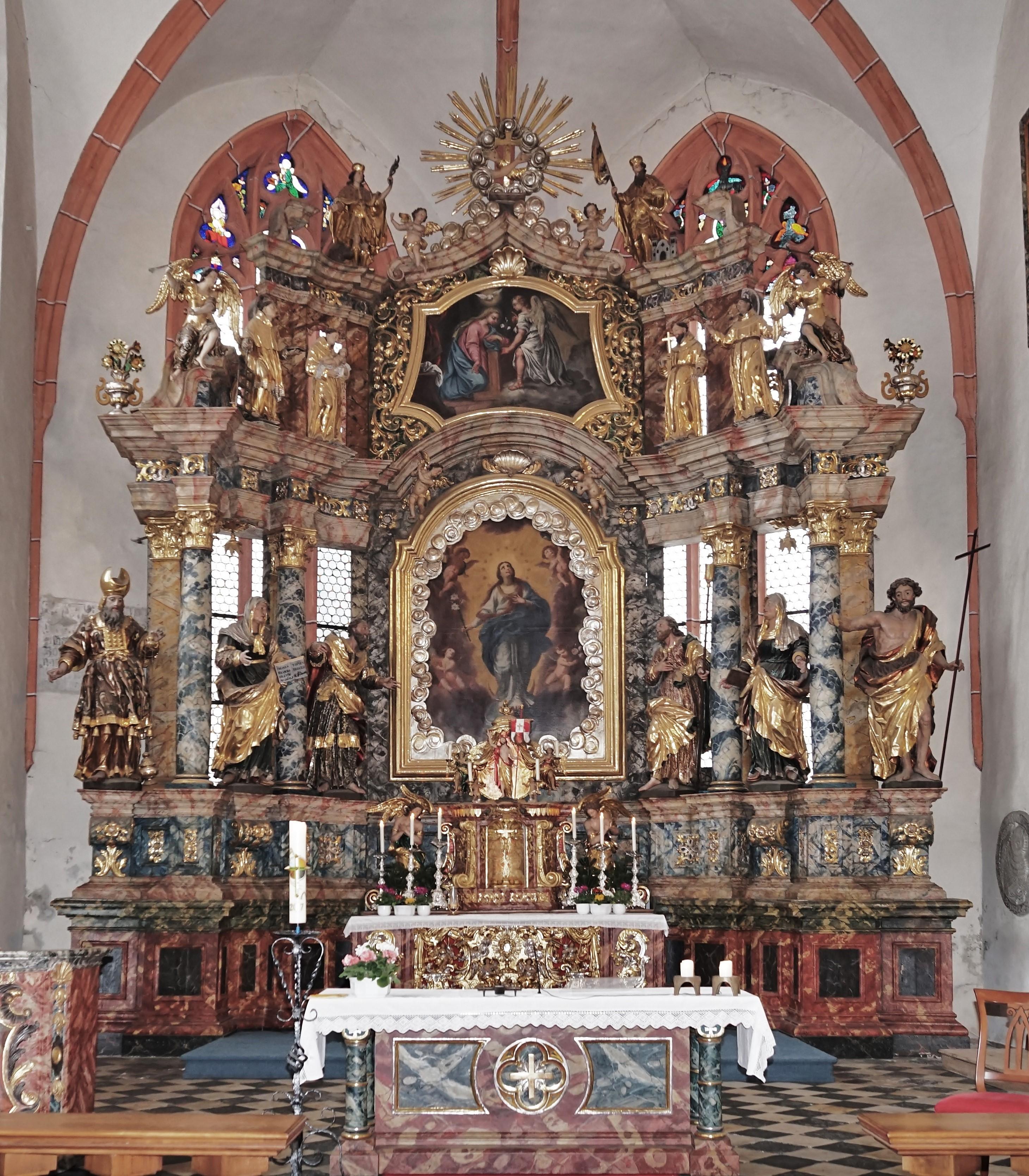 Klosterkirche Unsere Liebe Frau (St. Veit an der Glan), barocker Hochaltar von Johann Pacher